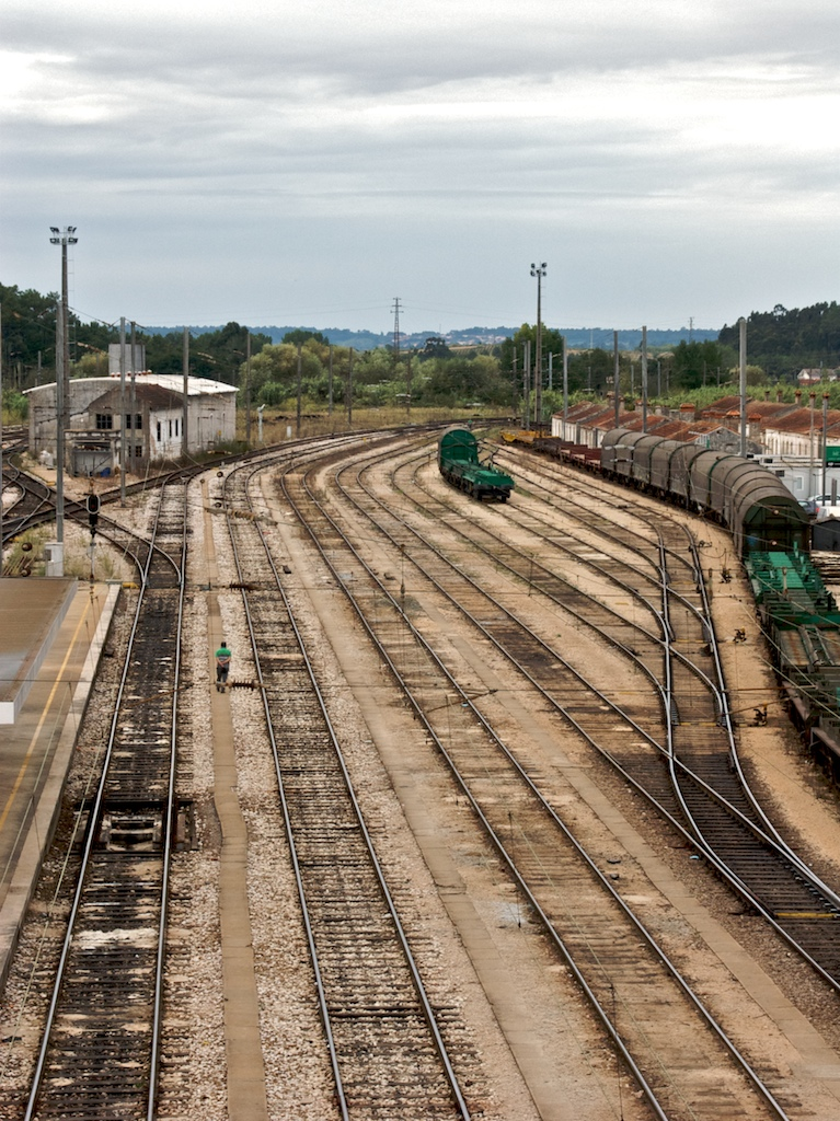 mais propriamente, a praia de vias da triagem e o início (actual) da Linha da Beira Alta. Tipo: E Estação Local: Pampilhosa Linha do Norte, PK 231 %u2022 Linha da Beira Alta, PK 50 Data e hora: 3 de Setembro de 2008 17h15